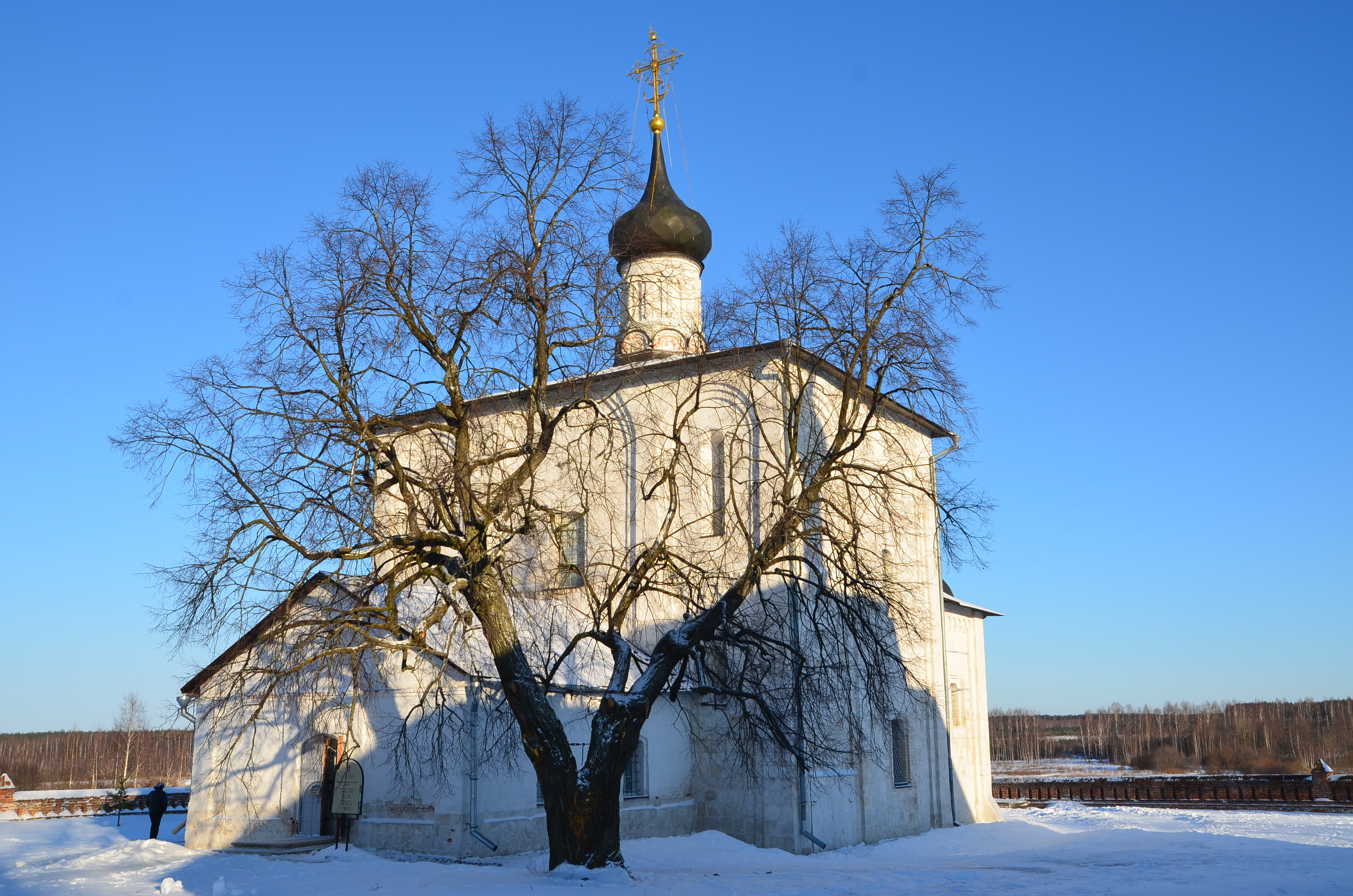 Церковь Бориса и Глеба: Кидекша, Суздальский район, Владимирская область